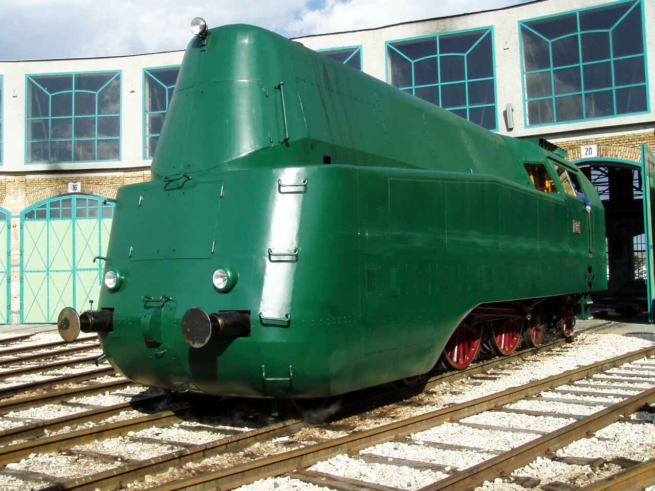 MÁV 242